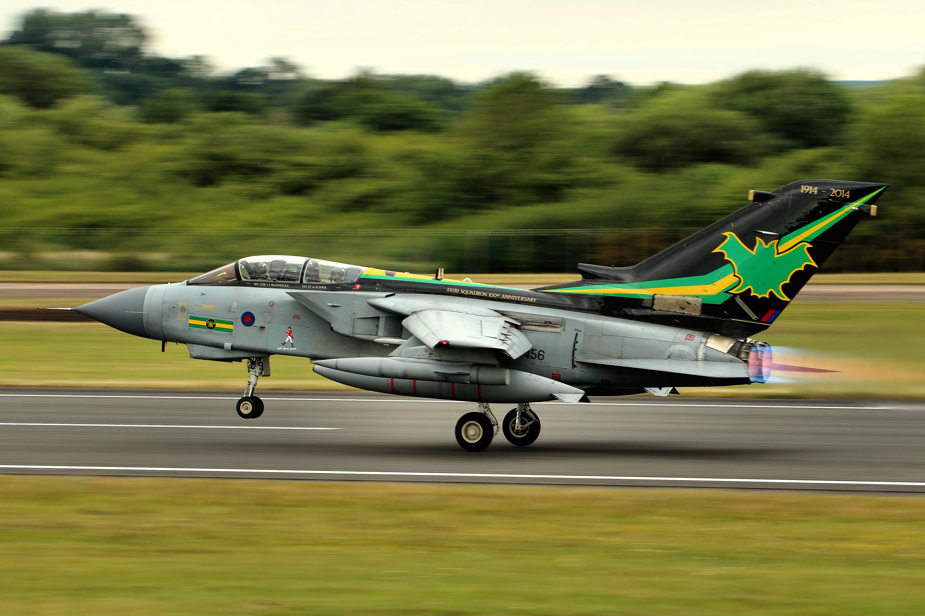 Tornado GR4 - RIAT 2015